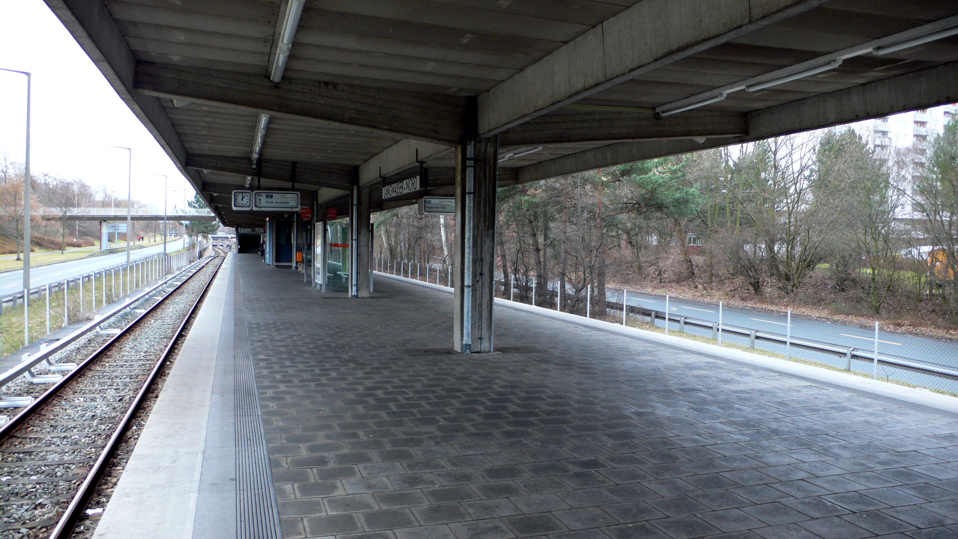 U-Bahnhof Langwasser Nord der U-Bahn Nürnberg, Bahnsteigebene, Blick von Norden